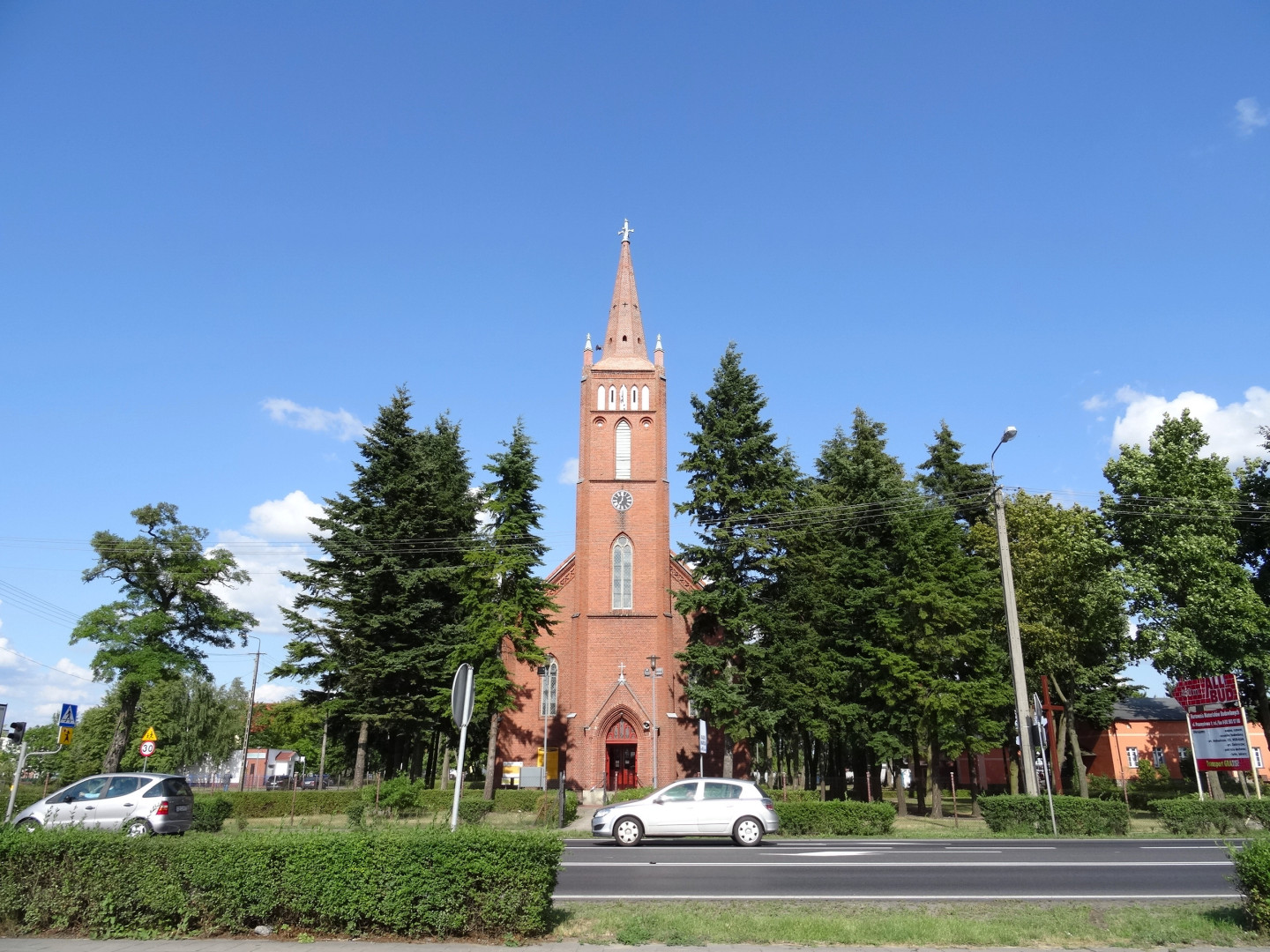 Kościół parafialny pw. Niepokalanego Poczęcia Najświętszej Marii Panny w Nowej Wsi Wielkiej, powiat bydgoski, archidiecezja gnieźnieńska